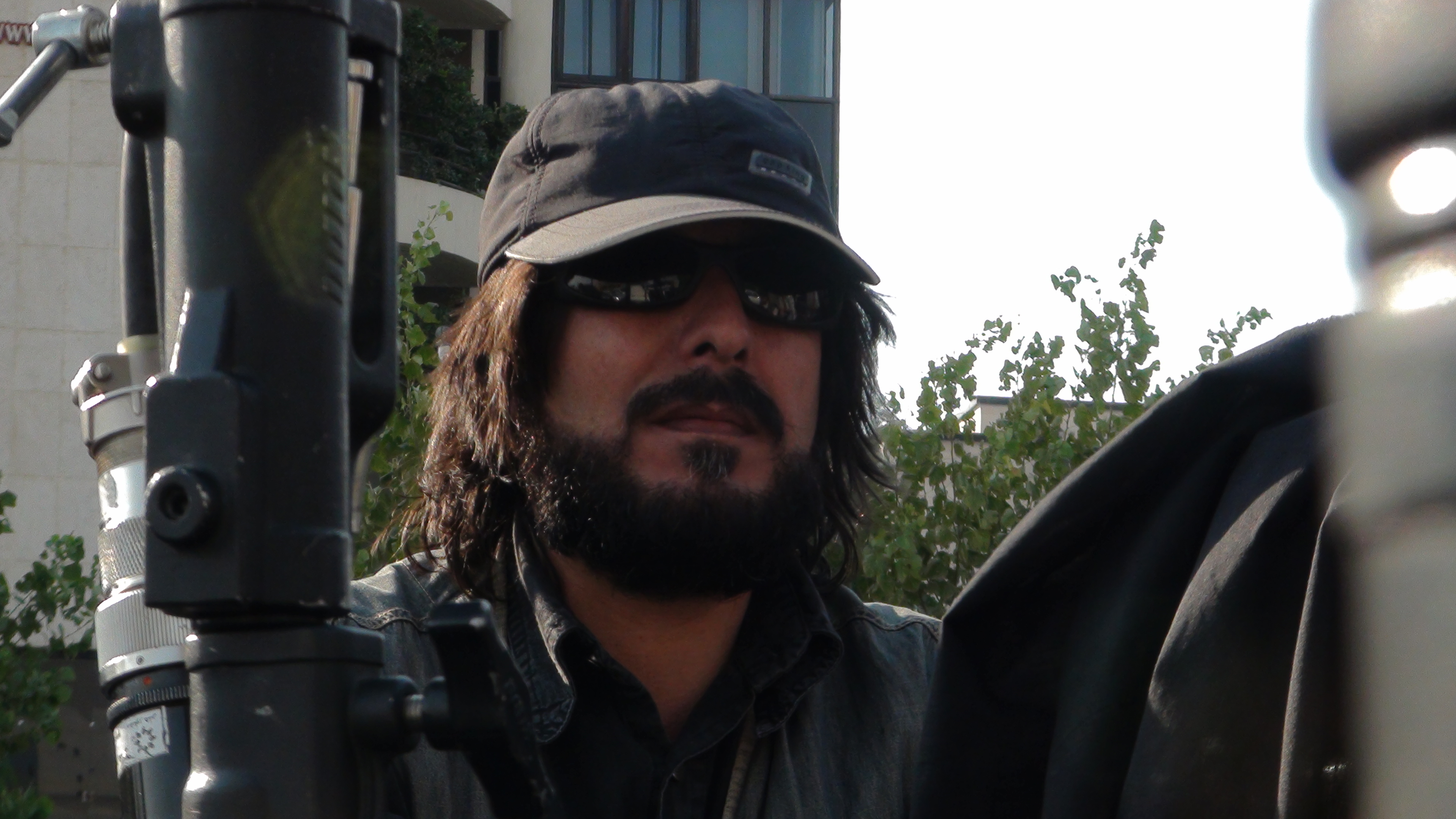 پشت صحنه فیلم بدون اجازه